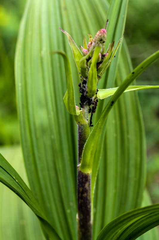 Alpengarten Villacher Alpe: Schwarzer_Germer